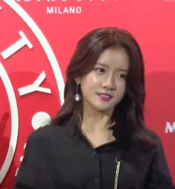 '우주소녀' 은서와 엑시가 22일 오후 강남구에 위치한 더 라움에서 열리는 2019 F/W 포토월에 참석했다.